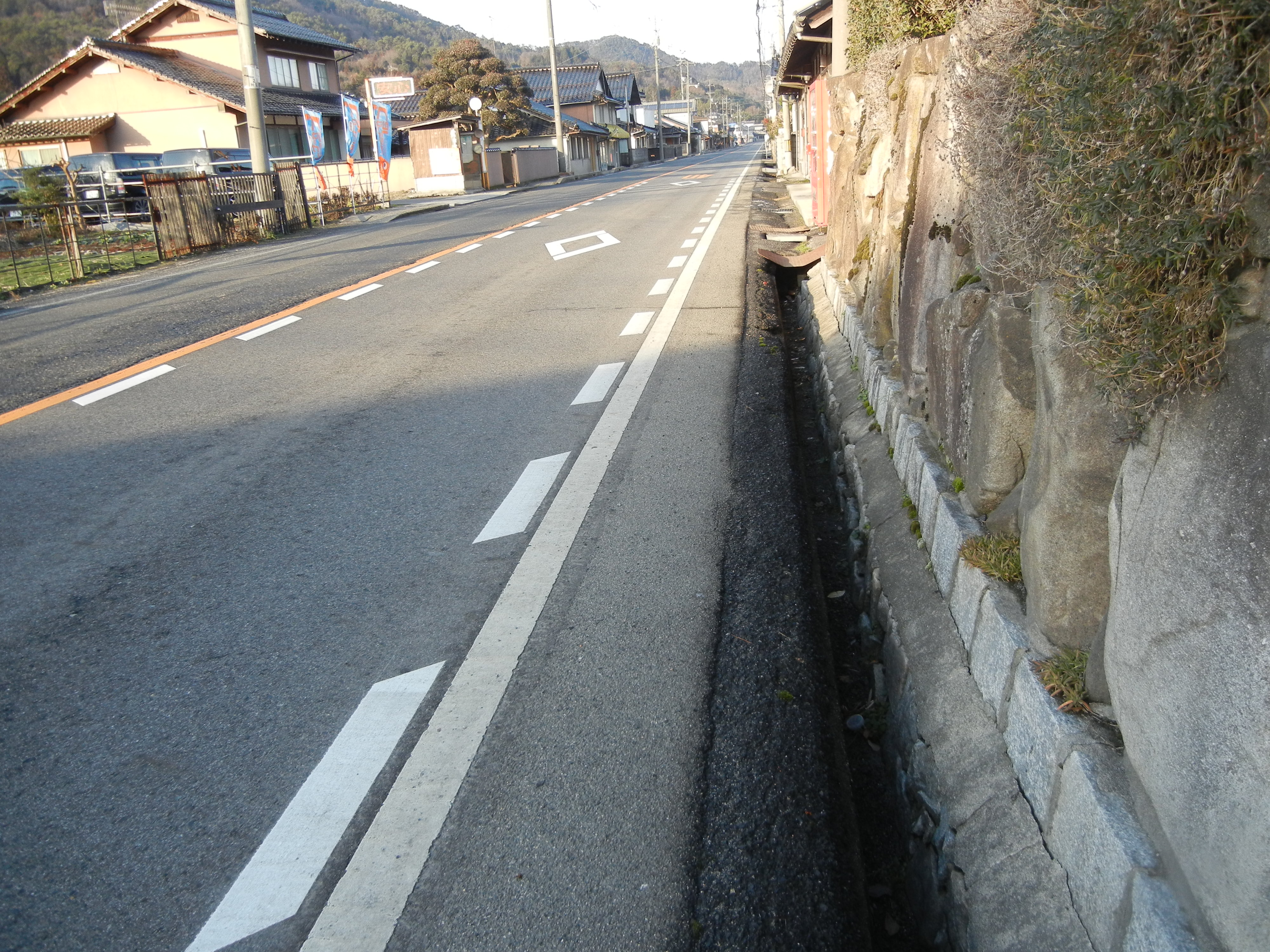 上根峠サミット周辺